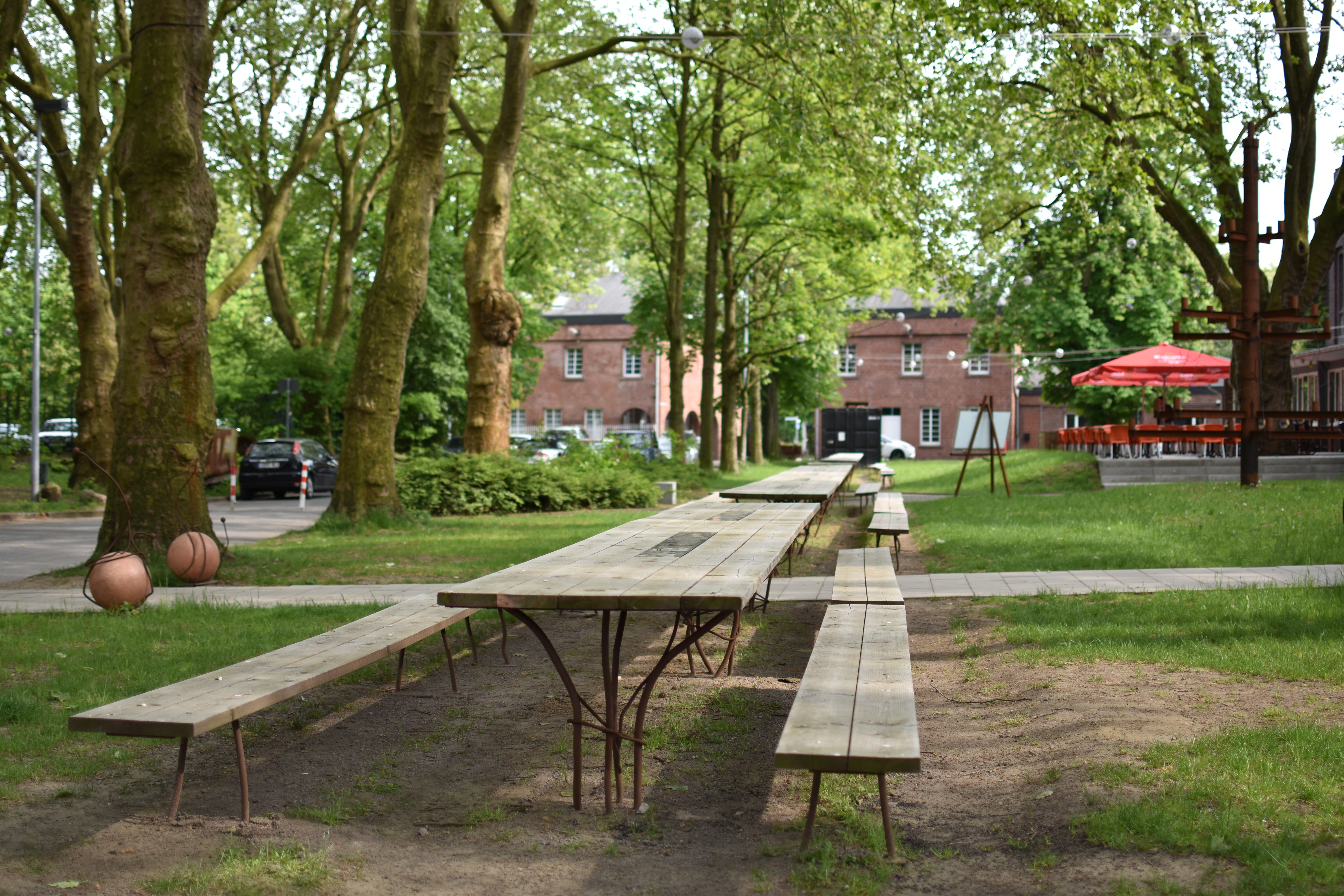 Das Bergwerk Fürst Leopold war ein Steinkohlenbergwerk im Dorstener Stadtteil Hervest und wurde Jahre nach seiner Schließung zum Creativquartier Fürst Leopold umgebaut. Heute befinden sich dort Gastronomiem und Ateliers.